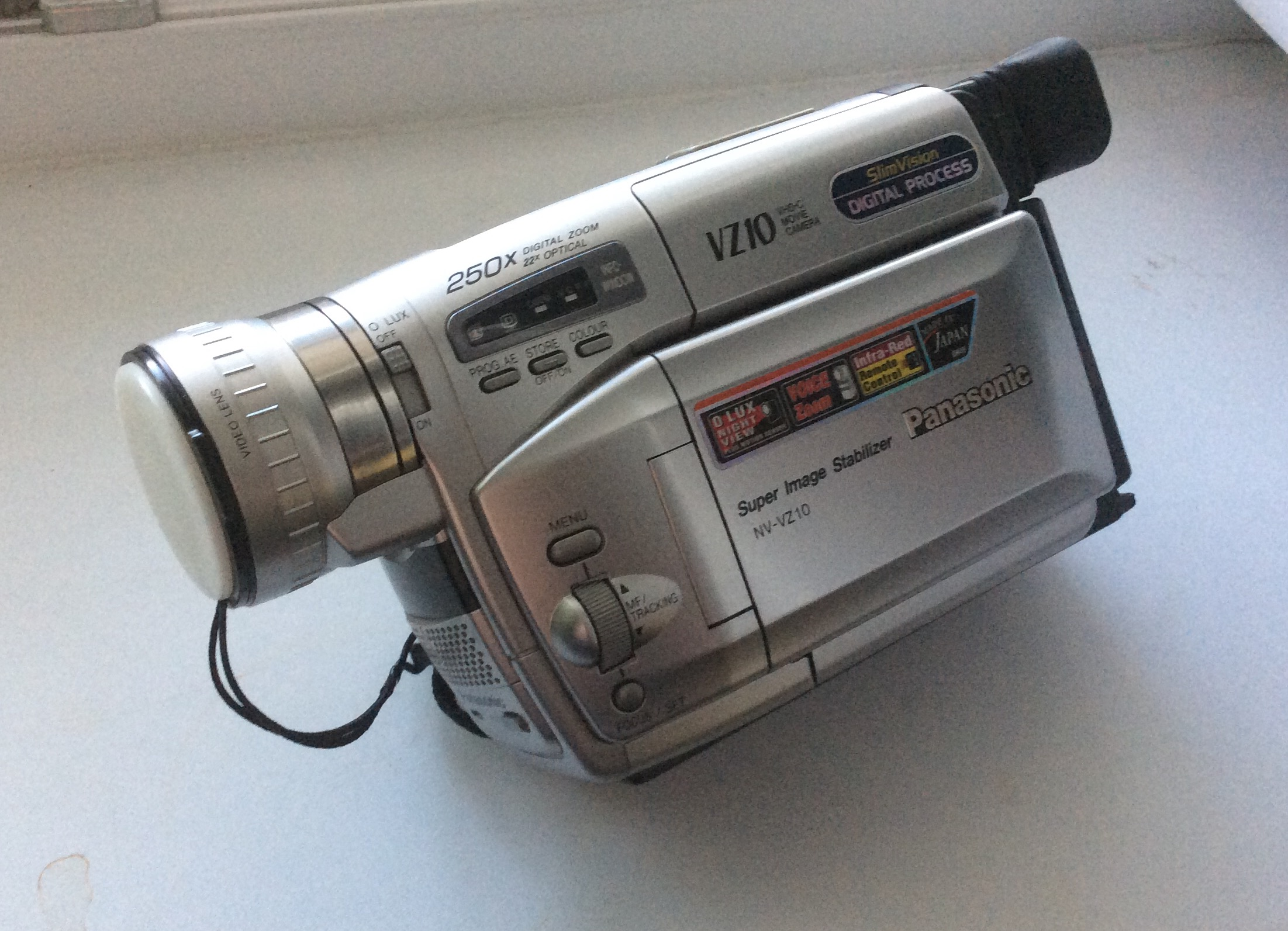 VHS-C камера японского производства компании Panasonic NV-VZ10